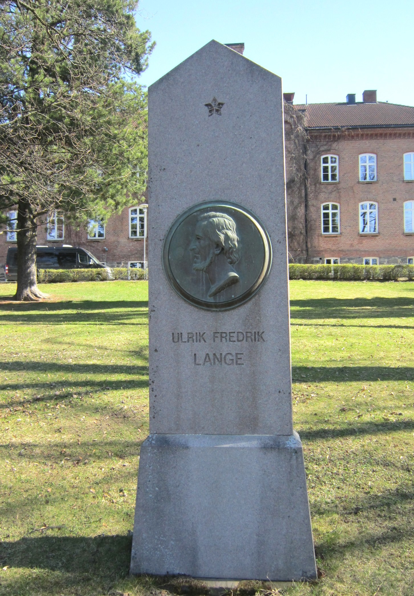 Minnesmerke over Ulrik Fredrik Lange (1808-1878) ved Lillehammer videregående skole. Minnesten reist 1881, portrettmedaljong av Stephan Sinding (1846-1922).